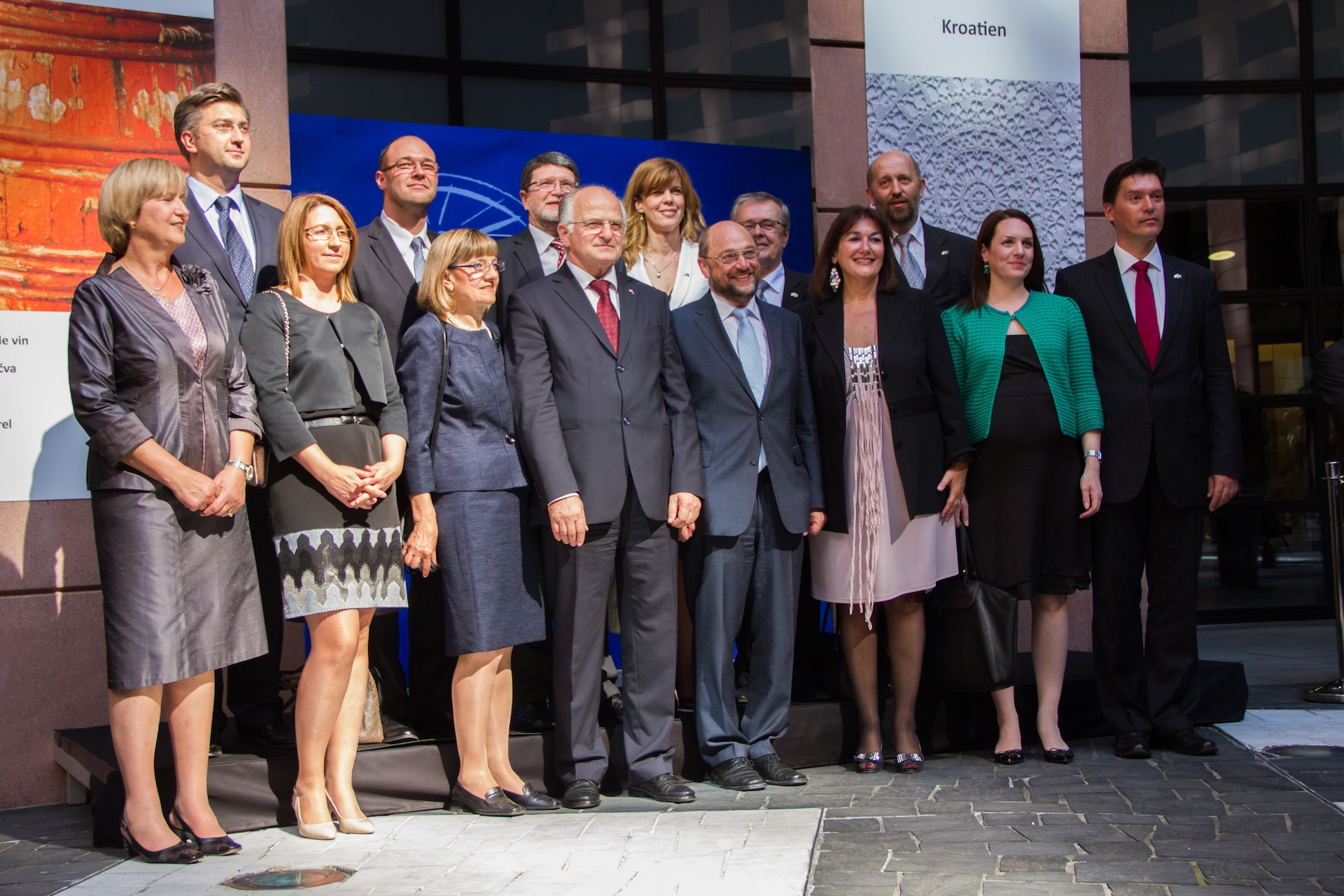 Cérémonie des couleurs au Parlement européen de Strasbourg à l’occasion de l’entrée de la Croatie comme 28ème État membre de l’Union européenne